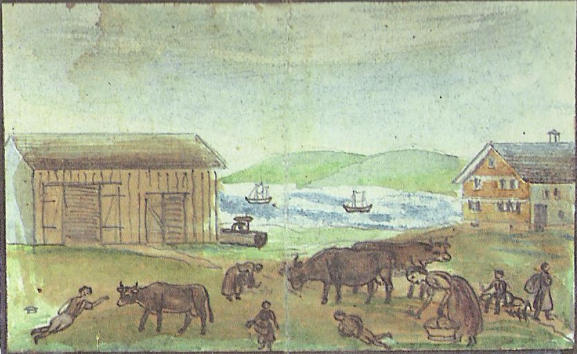 Hunger in der Schweiz 1817 (hungernde Menschen, die gemeinsam mit dem Vieh am Grasen sind)